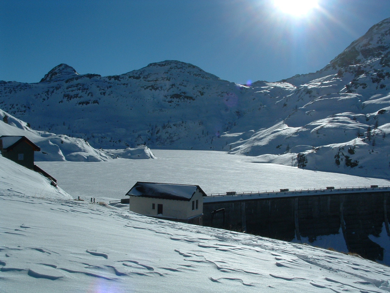 Laghi Gemelli, Orobie.